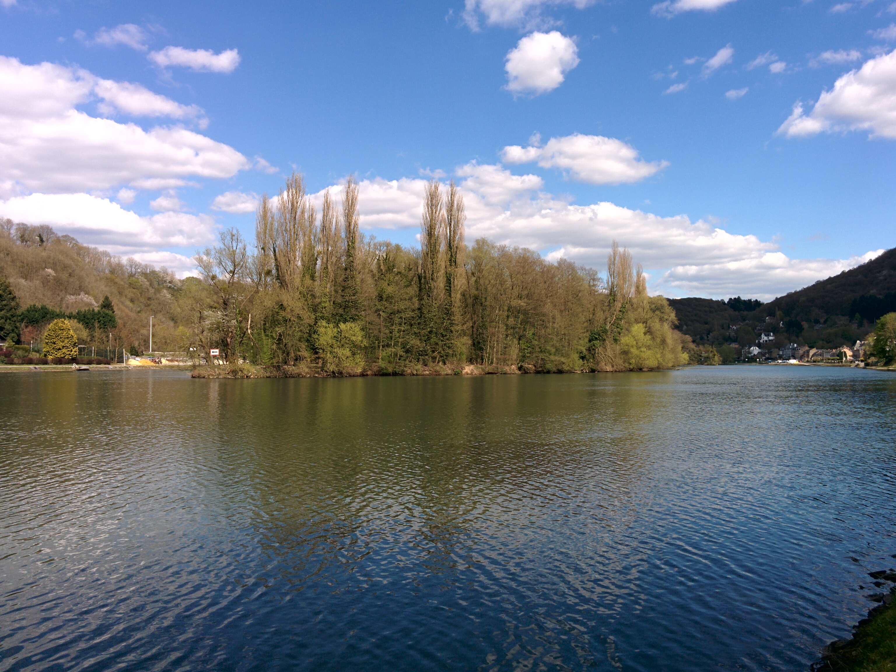 Grande Île des Îles de Godinne, en amont. Photo prise à partir de la rive droite de la Meuse.